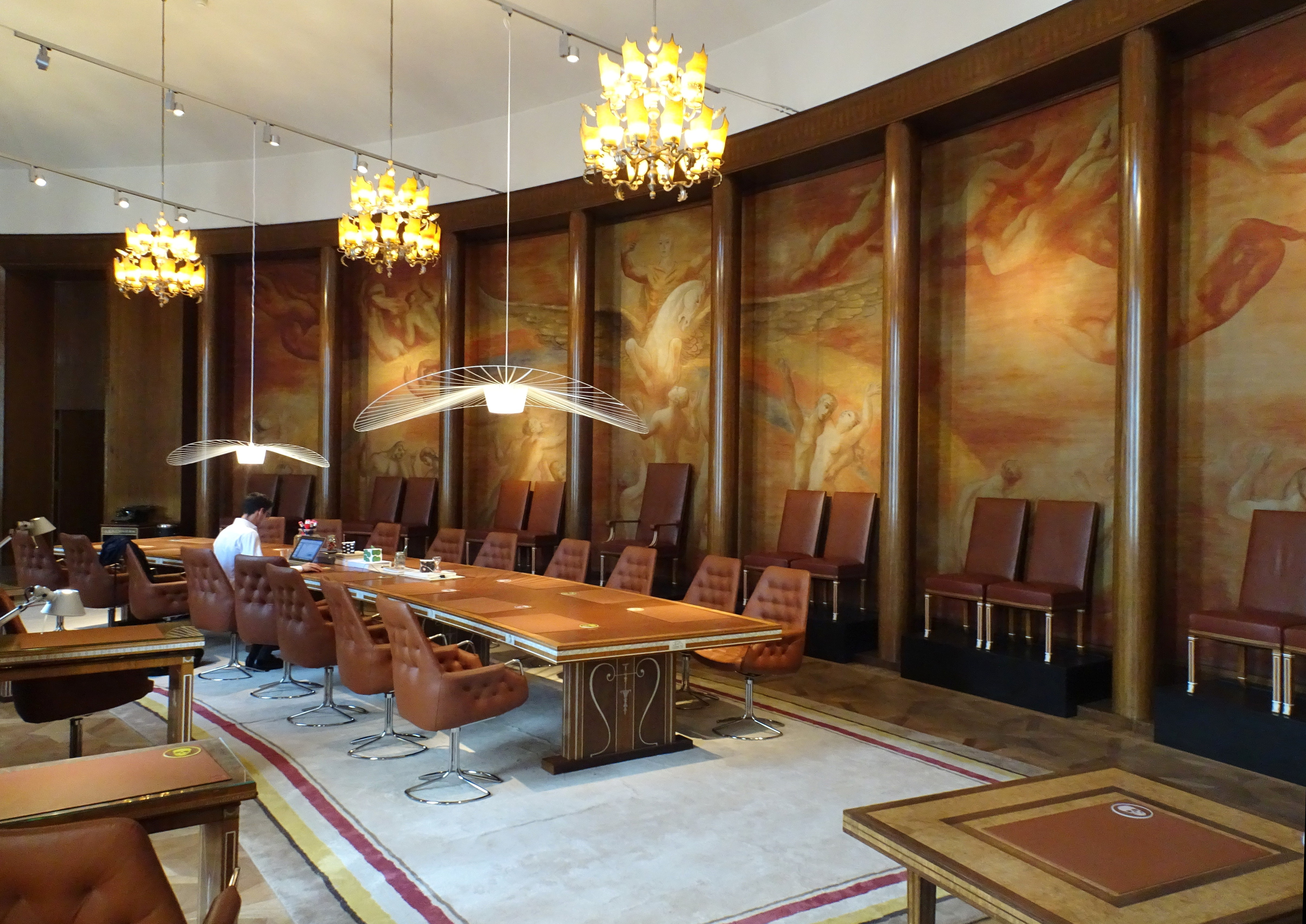 Tändstickspalatset Sessionssal, modern pendelarmaturer modell Vertigo, formgivna av Constance Guisset